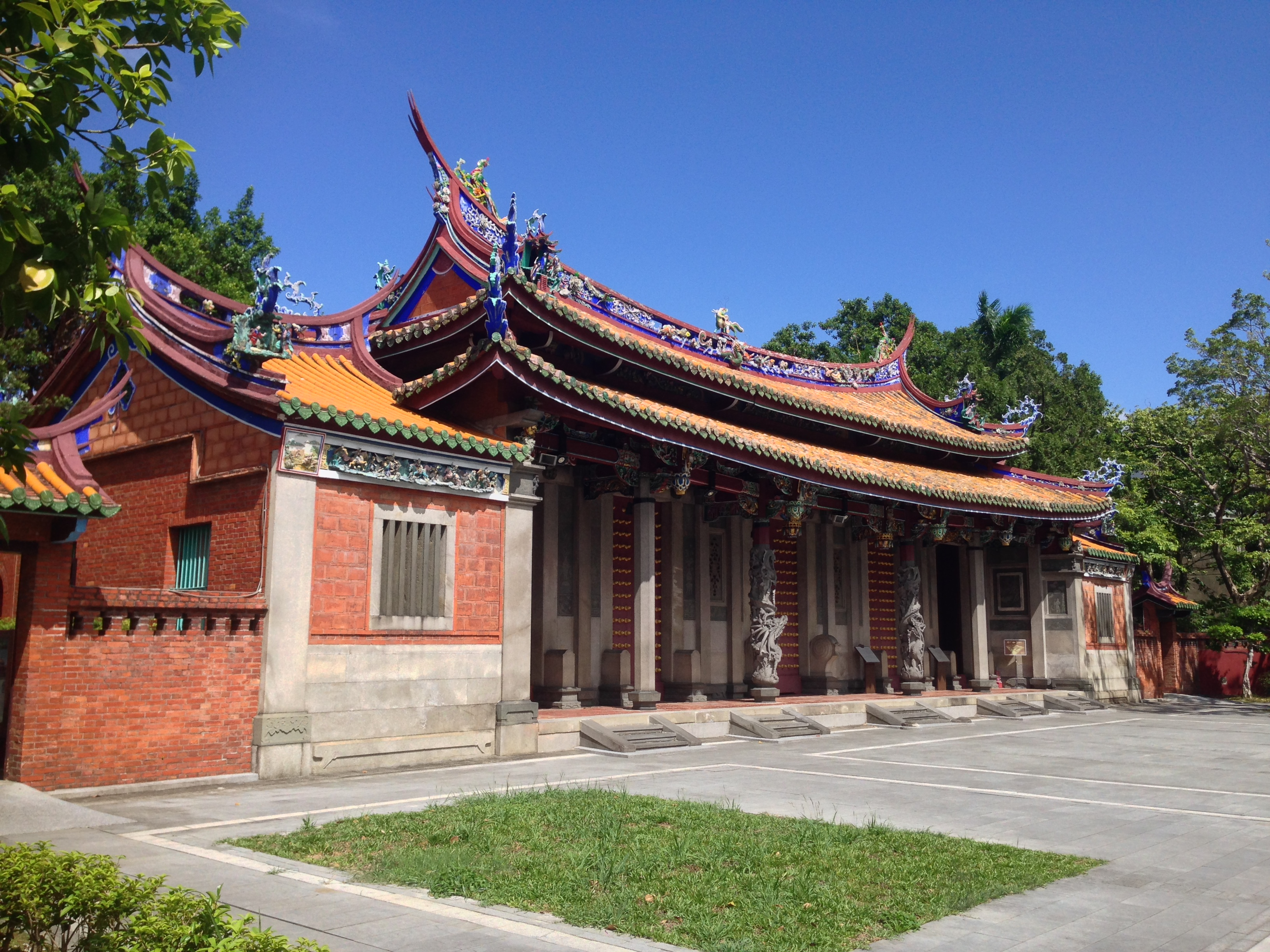 中文（台灣）: 台北孔子廟櫺星門